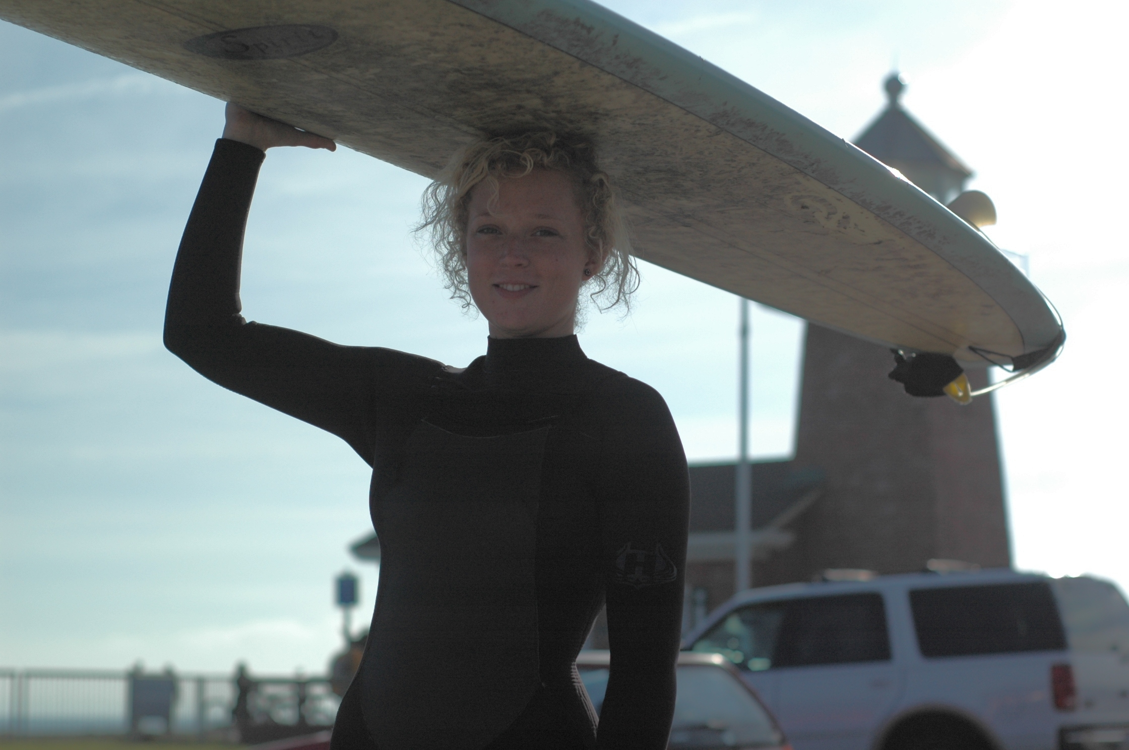 Surfer girl